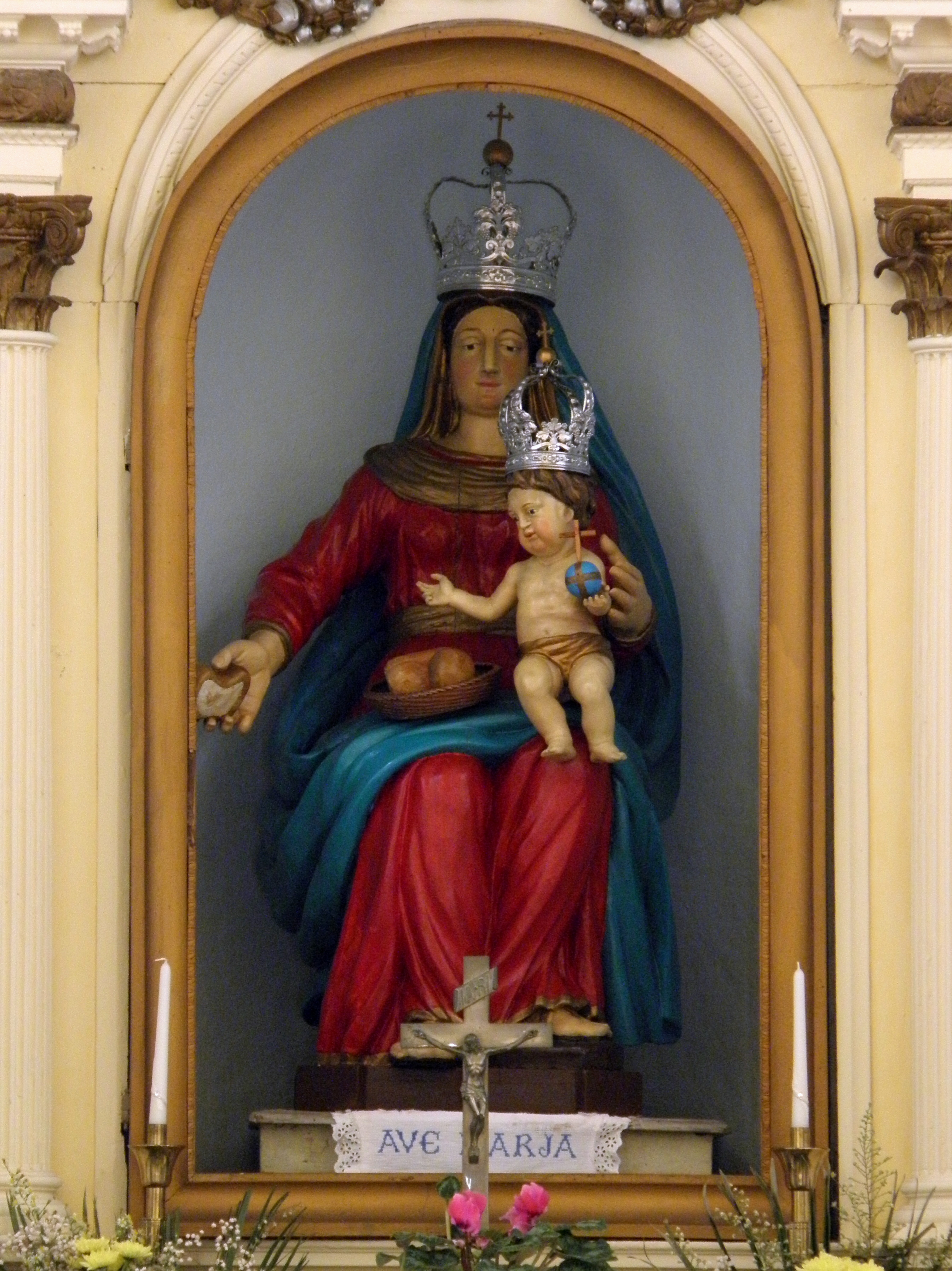 Giacciano, frazione del comune sparso di Giacciano con Baruchella: oratorio della Beata Vergine della Mercede, popolarmente detto Madonna del Paneto, interno, la statua della Beata Vergine della Mercede posta nell'altare.